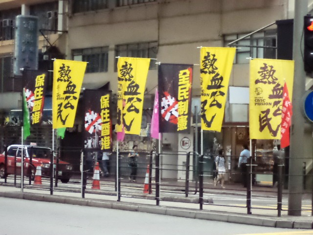 中文（香港）: 熱血公民旗幟